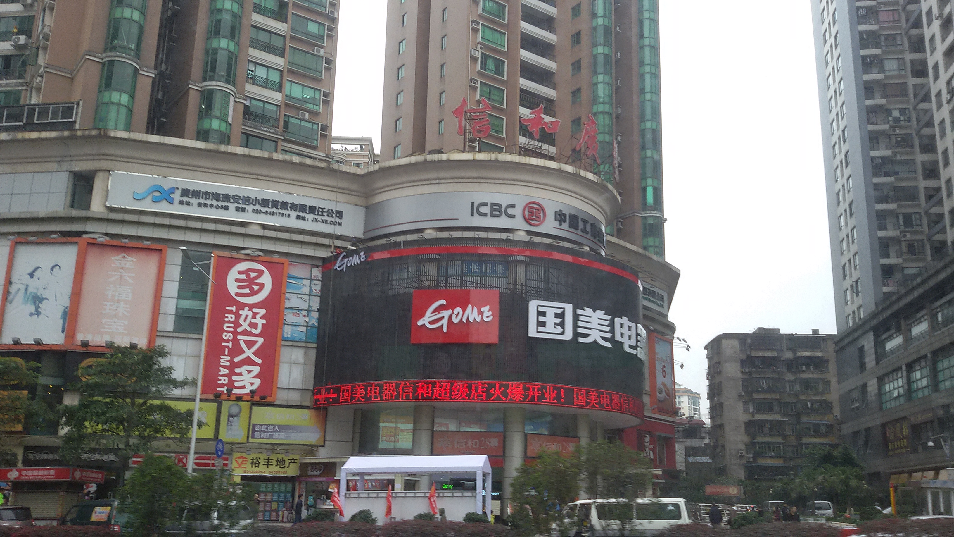 粵語: 廣州嘅信和廣場